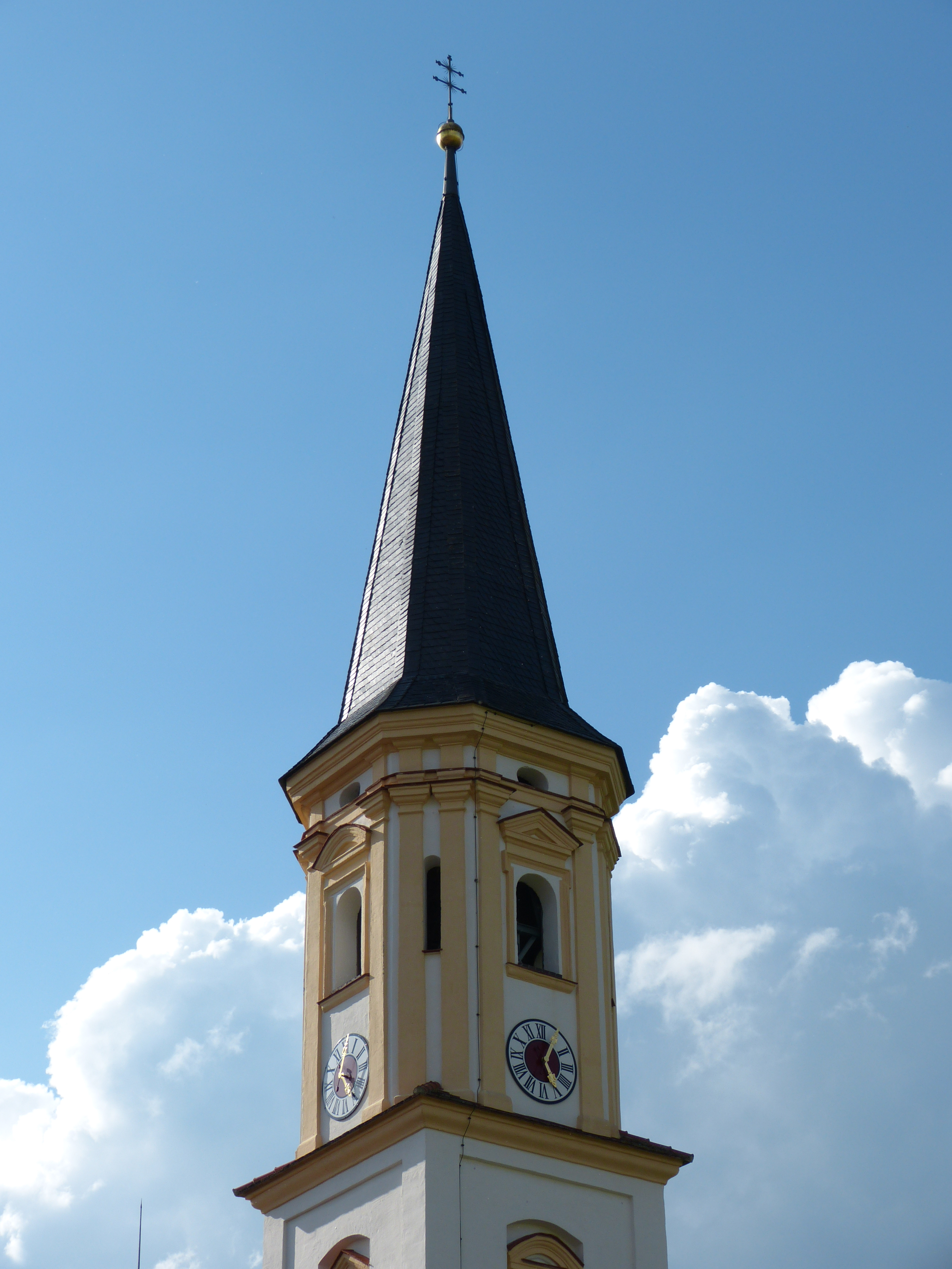 St. Johannes Baptista im Ortsteil Könghausen, Eppishausen, Landkreis Unterallgäu, Bayern